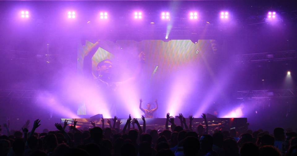 Кямран Гаралов перед выступлением Armin van Buuren